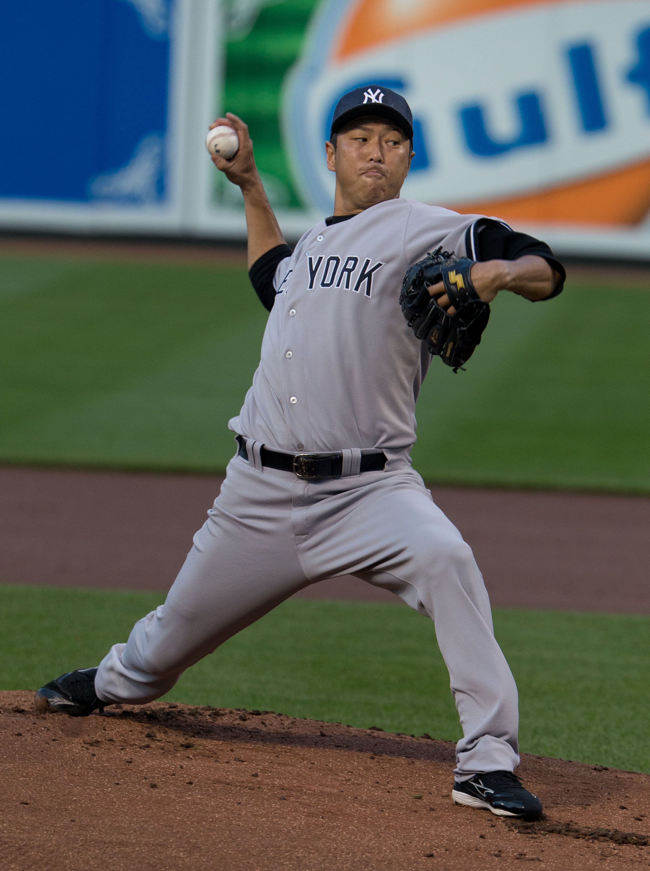 Hiroki Kuroda